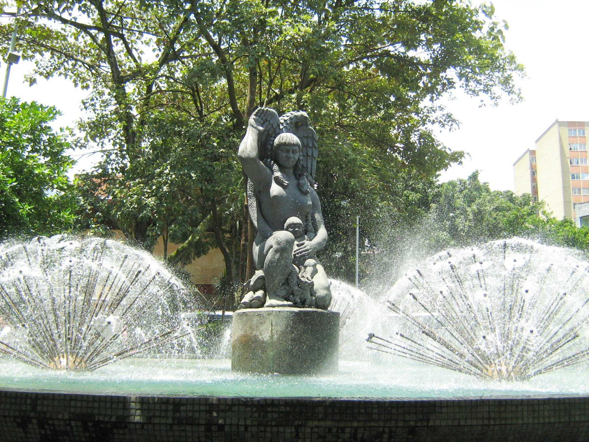 La Bachué obra de José Horacio Betancur, hace parte de la fuente ubicada al frente del Teatro Pablo Tobón Uribe. Medellín, Colombia.